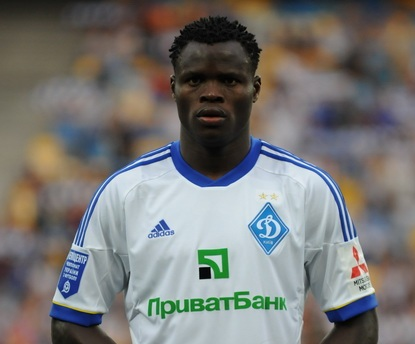 Taye Taiwo in Dynamo Kyiv